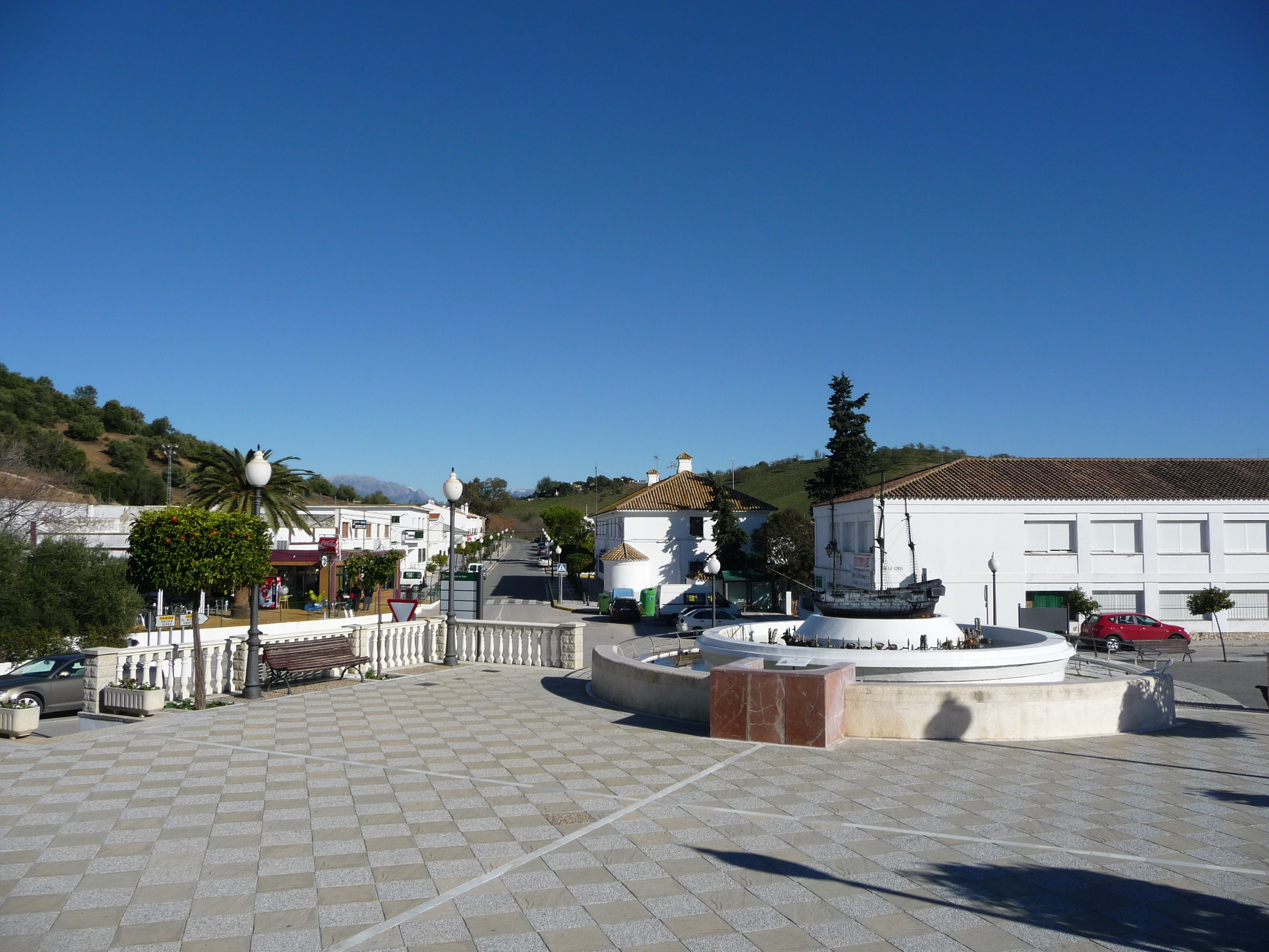 Algar-P1060336.JPG